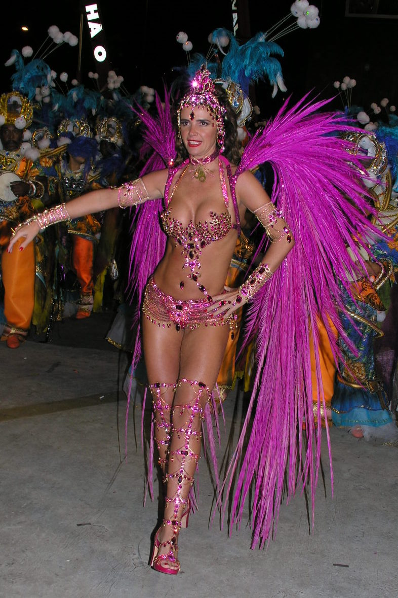 Brazilian carnival queen Luma de Oliveira